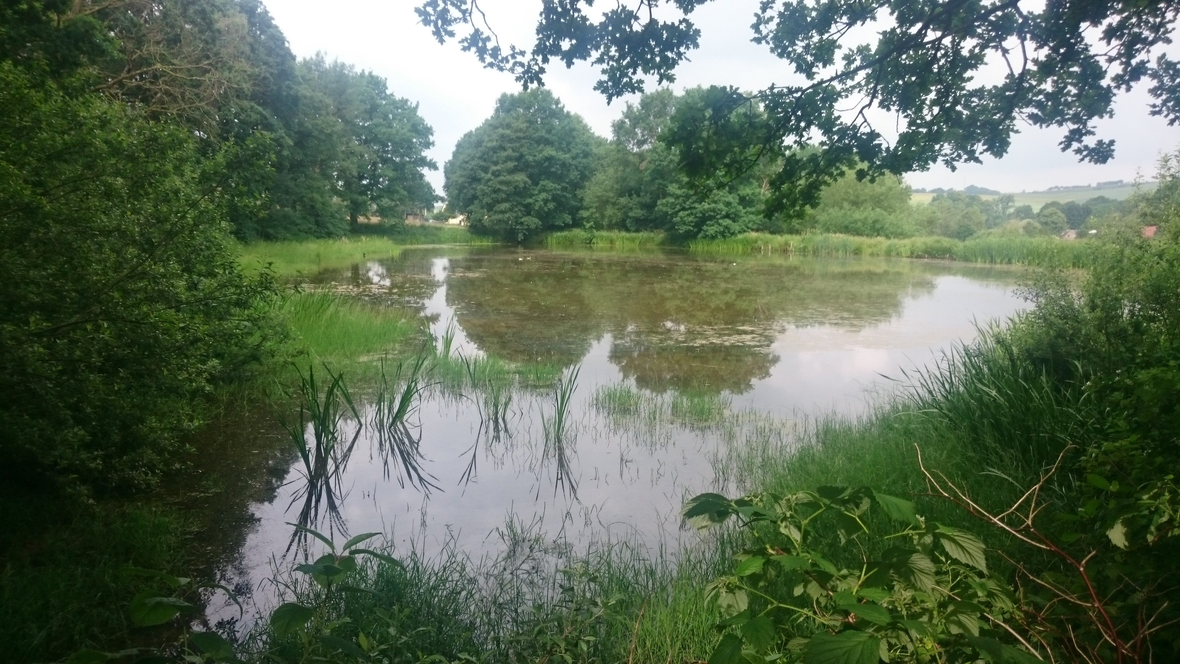 Die Zschockener Teiche im FFH-Gebiet "Wildenfelser Bach und Zschockener Teiche"